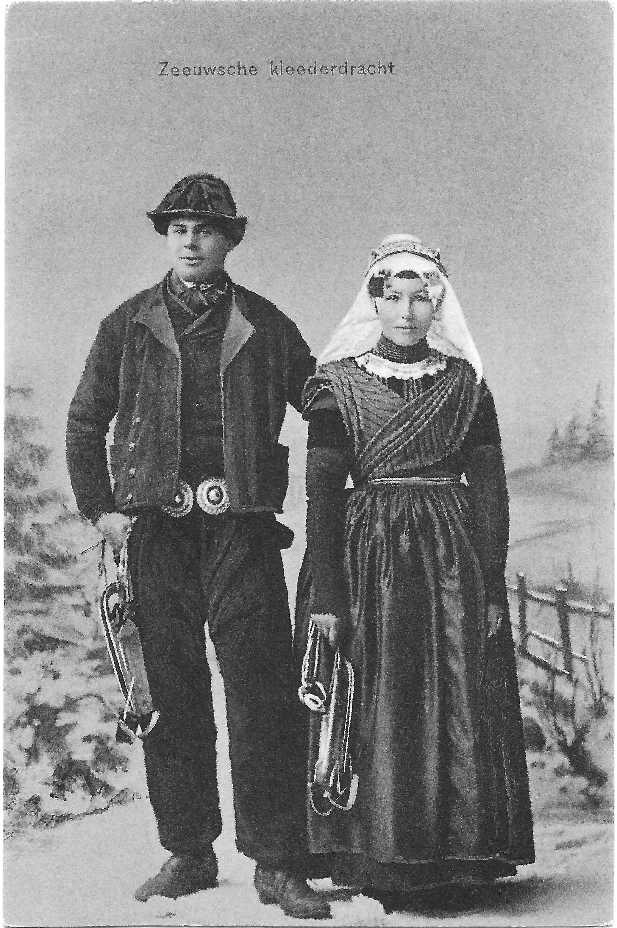 Zeeuwse Klederdracht. Foto voor een schildering van een besneeuwd landschap. De personen hebben ieder een paar schaatsen in de hand